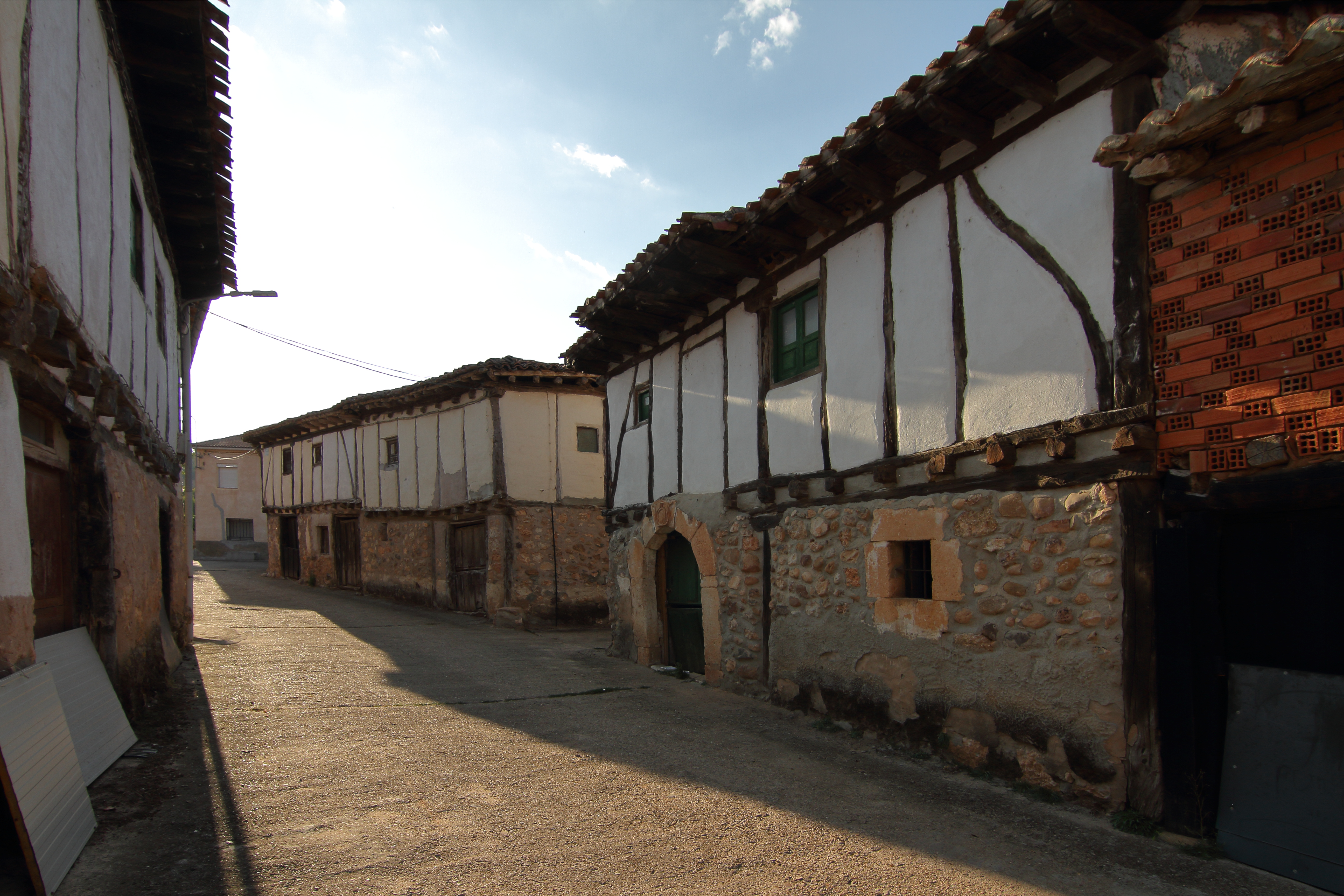 Retuerta, edificio 09